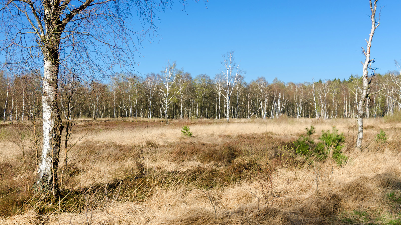 NSG Duvenstedter Brook in Hamburg, Heidefläche und Steppenlandschaft im April